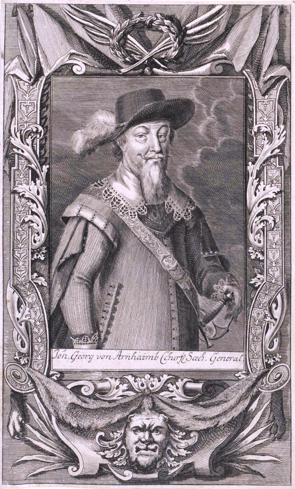 Johann Georg von Arnim (1583–1641)